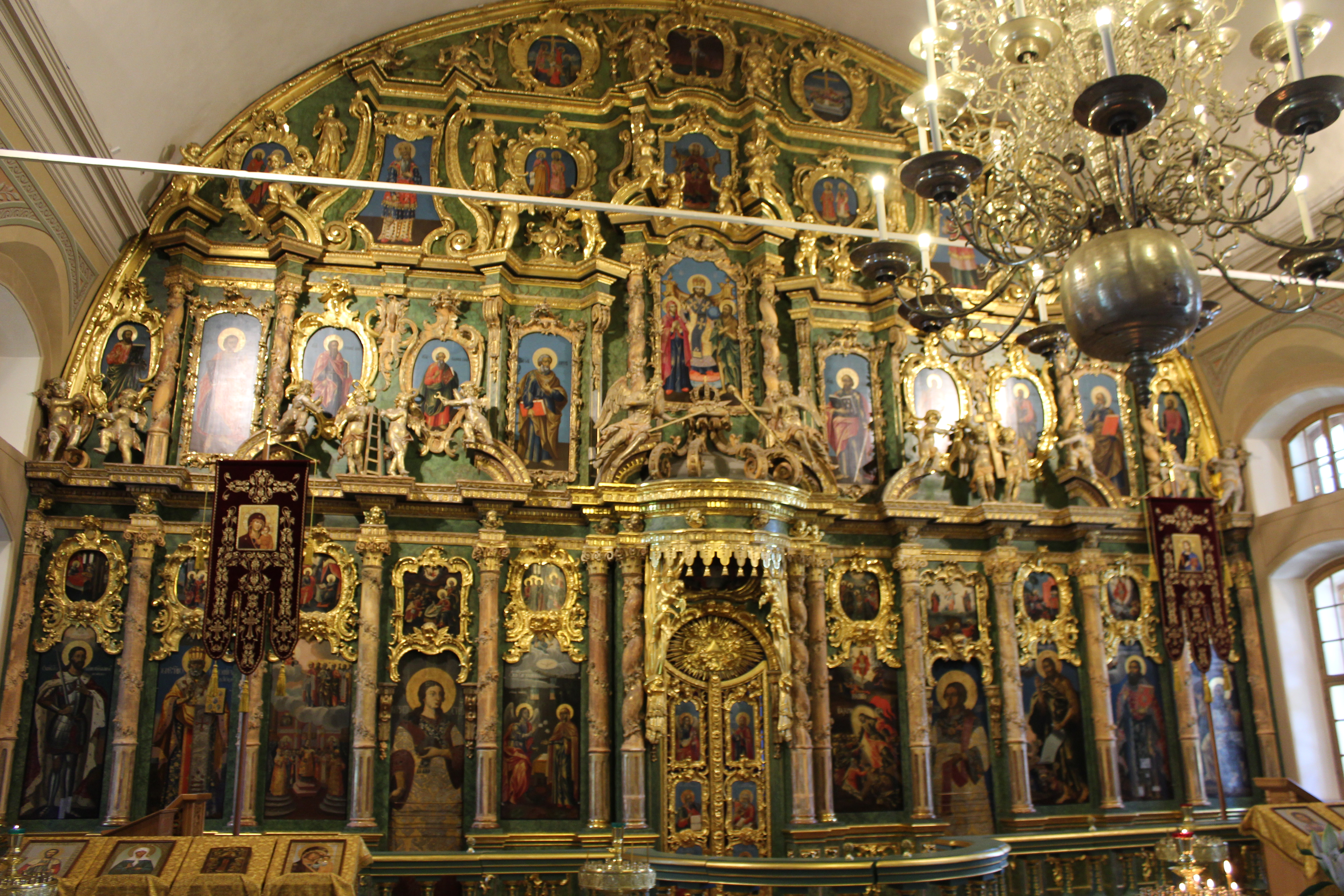 Сампсониевский собор: Большой Сампсониевский проспект, 39-а, 41, Выборгский район, Санкт-Петербург